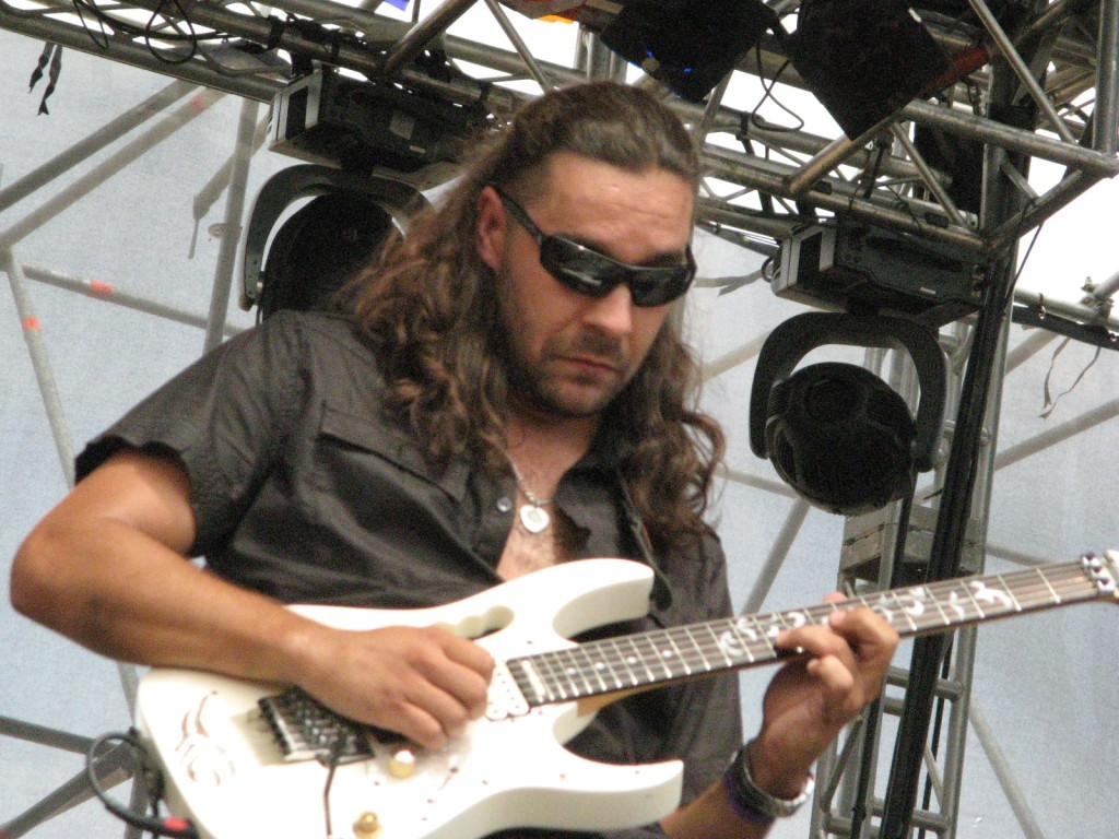 Mario Gutierrez Guitarra y coros